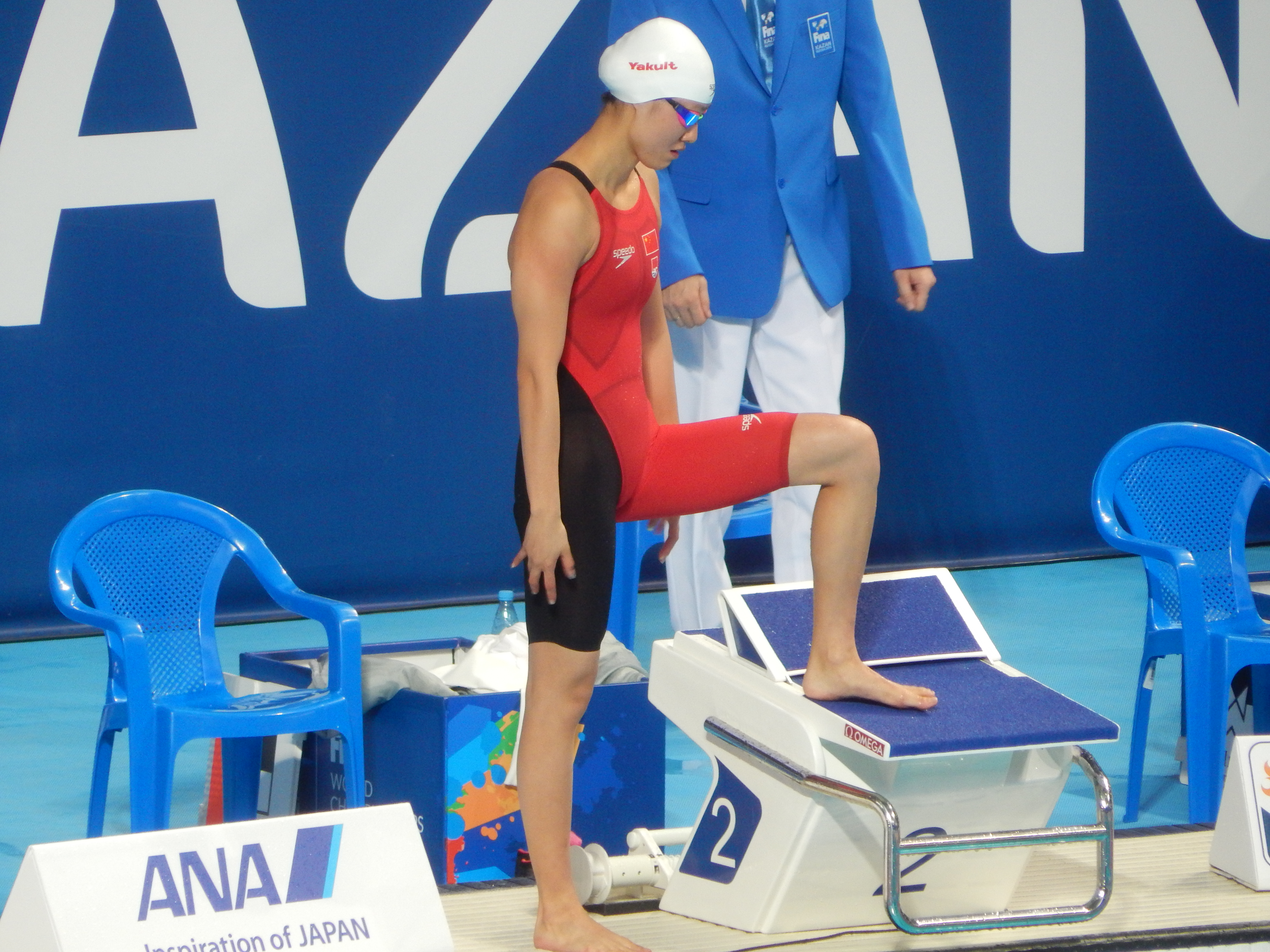 Лю Сян на чемпионате мира в Казани